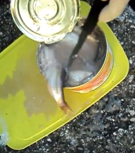 Odprta pločevinka Suströmming-a